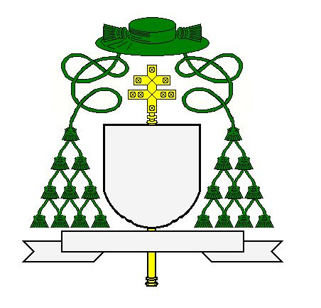 Eigen tekening. Het schild en het motto zijn geen onderwerp van kerkelijke heraldiek en zijn daarom leeg gelaten Robert Prummel